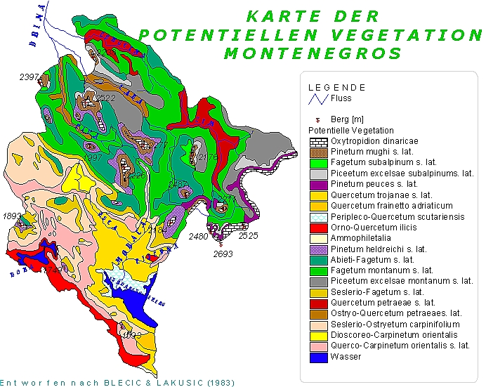 Potentielle natürliche Vegetation in Montenegro / für Diplomarbeit nach Blecic & Lakusic mit ESRI Arcview 3.2a gezeichnet